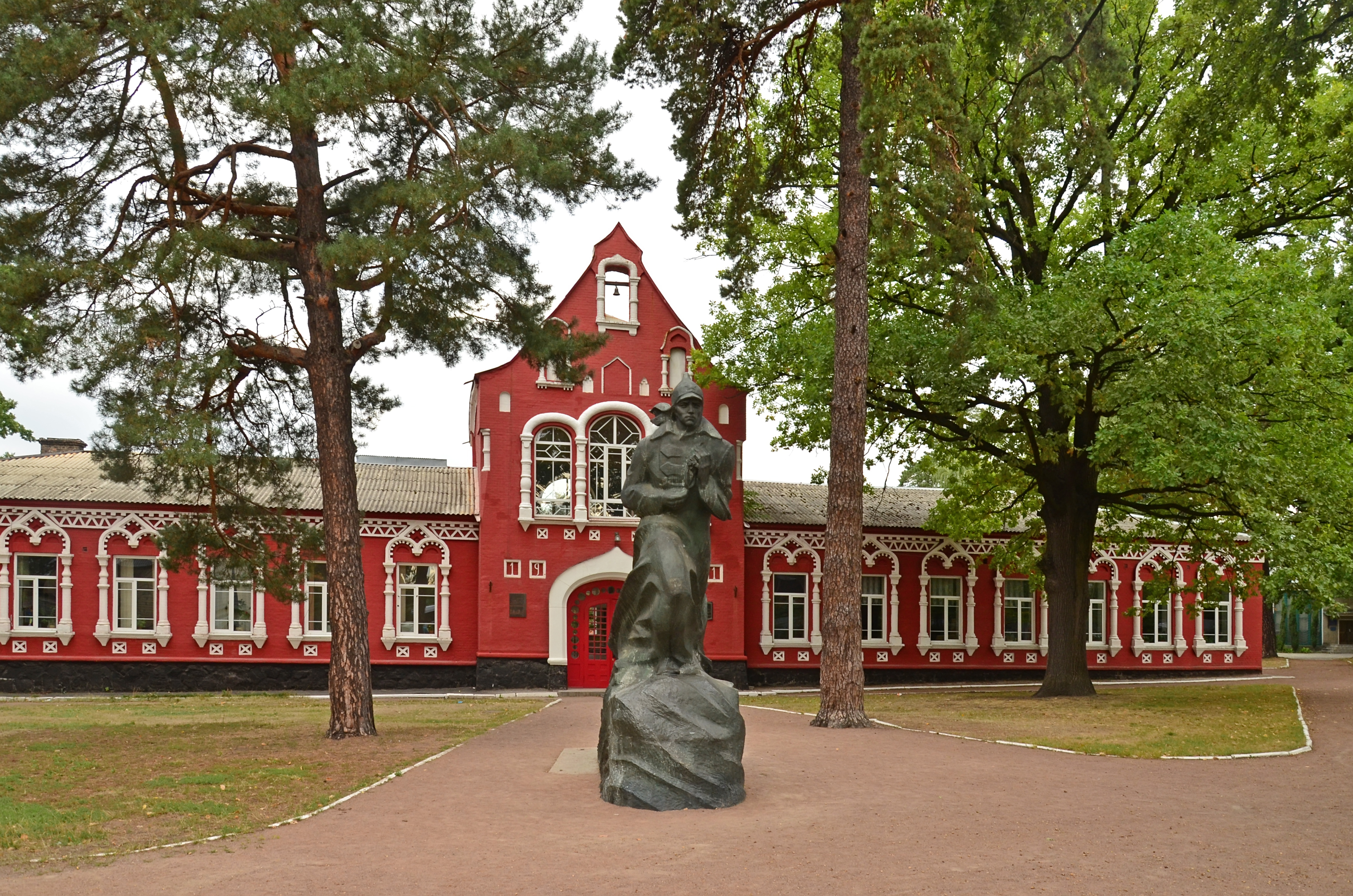 Будинок, в якому жив Микола Островський, та пам'ятник Павлу Корчагіну, Боярка, вул. Жовтнева, 49